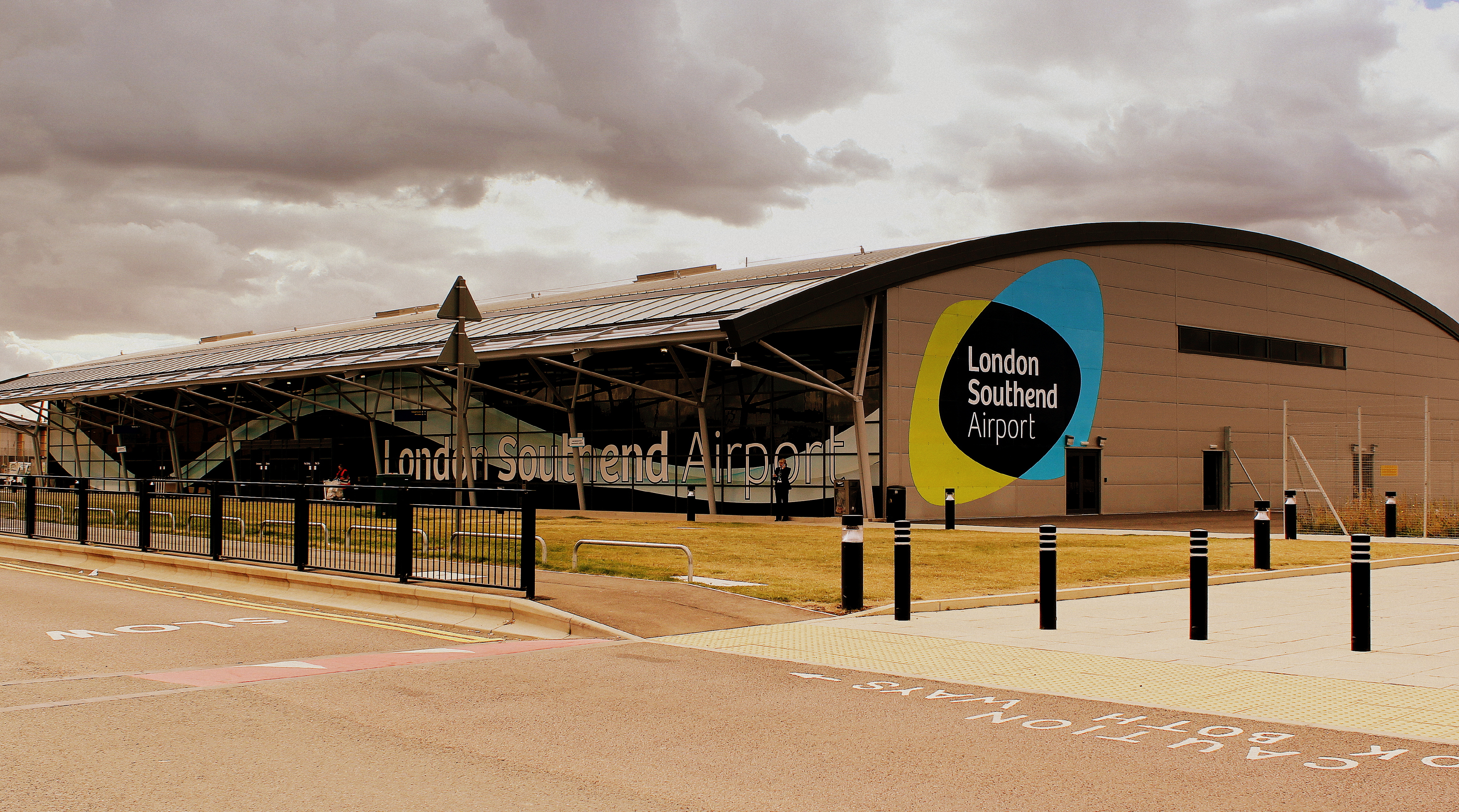 LONDON SOUTHEND AIRPORT SEP 2012